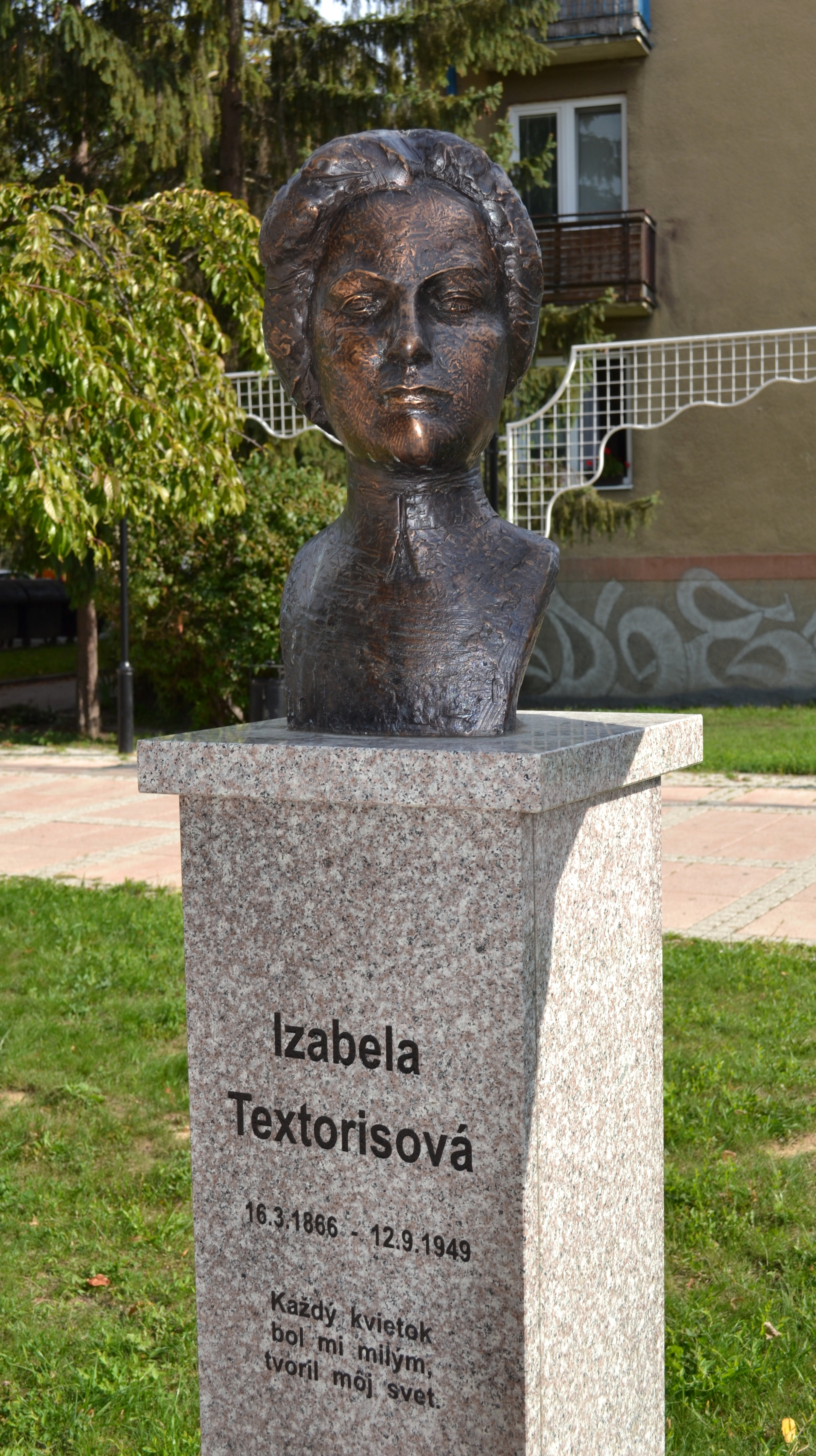 Aleja dejateľov, busta Izabely Textorisovej